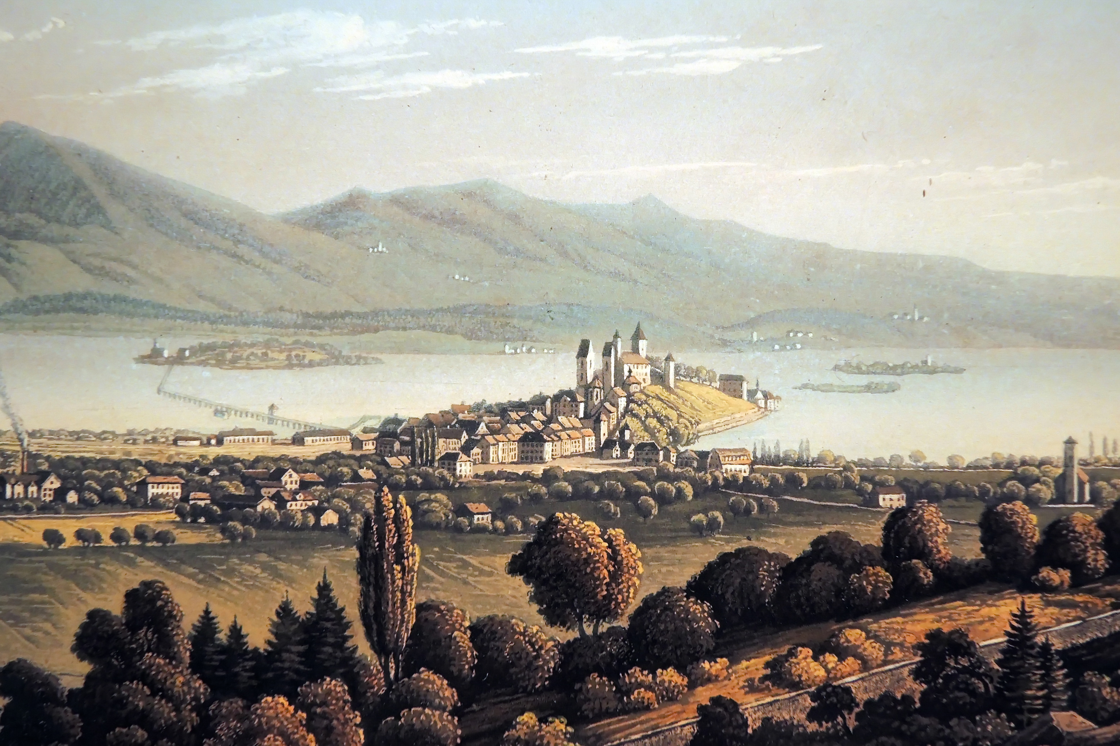 Rapperswil : Rapperswil und Umgebung vom Meienberg aus, 1835.